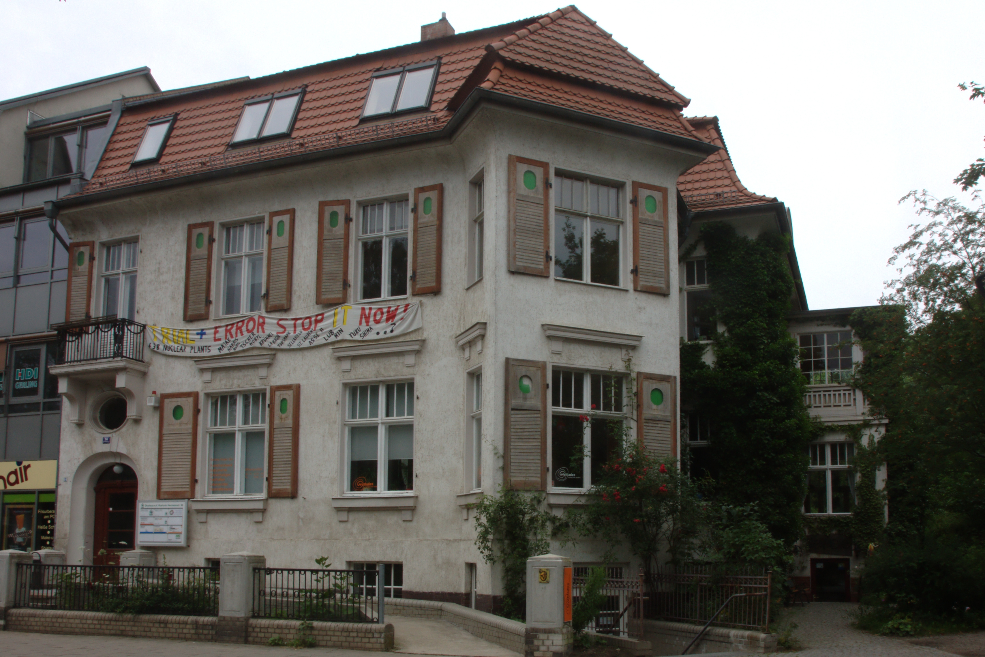 Hermannstraße 36, Rostock (Baudenkmal)